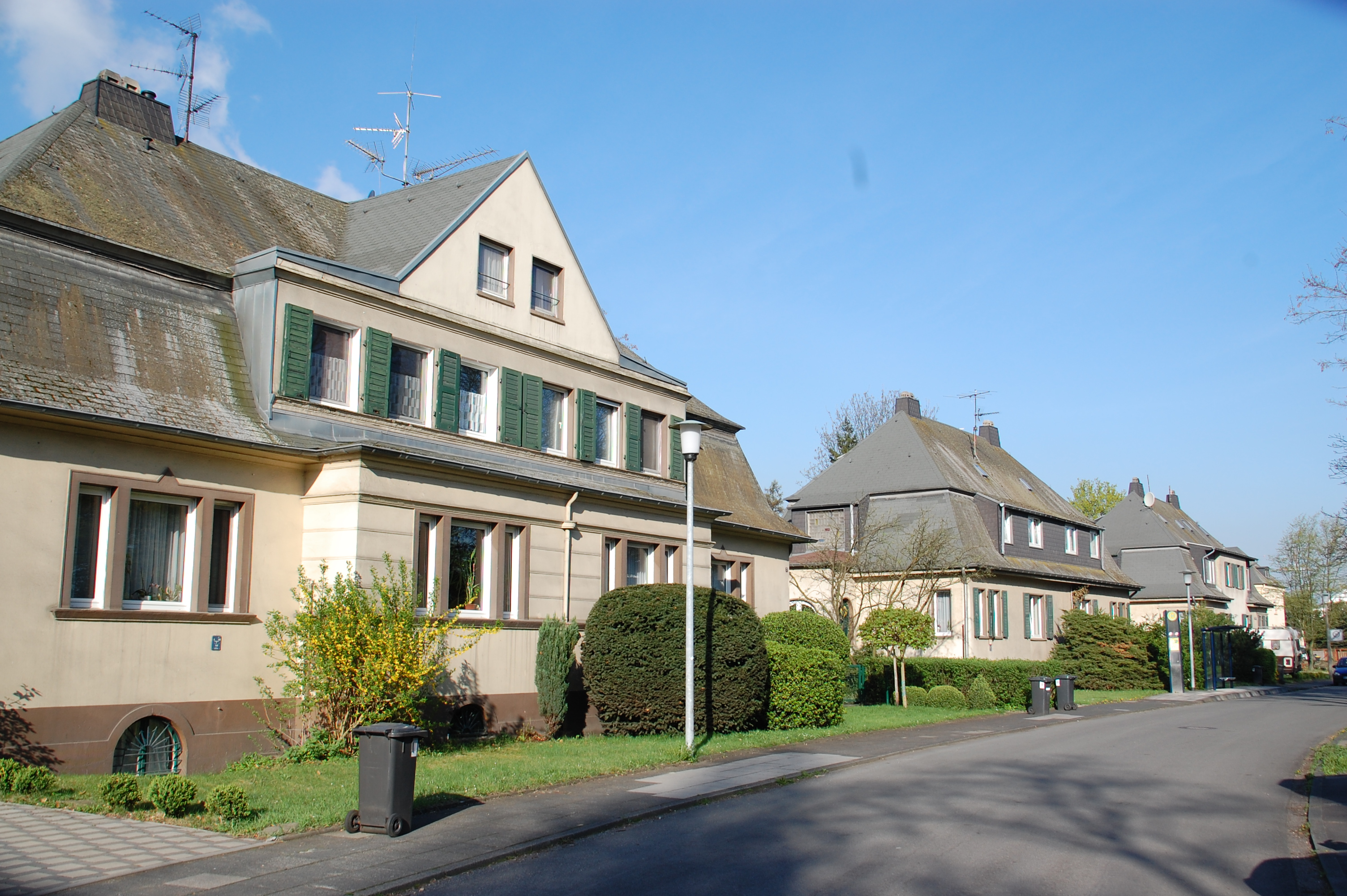 Knapsack, Hürth, Germany: Werkswohnungen Dr.-Krauß-Straße This is a photograph of an architectural monument.